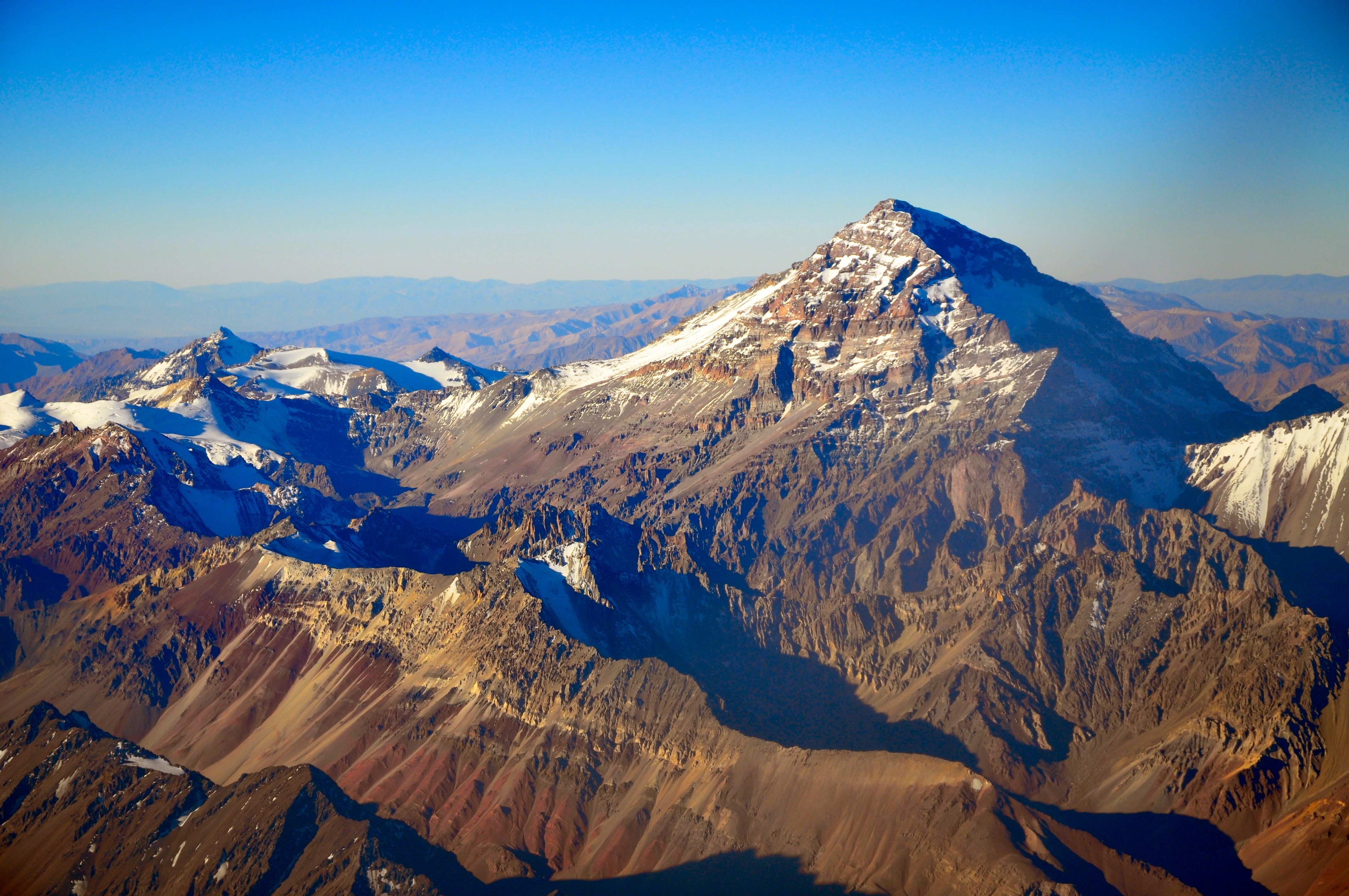 Aconcagua